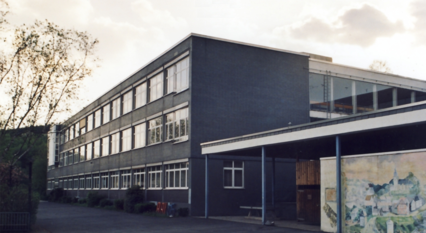 Wüllenweber Gymnasium Frontansicht